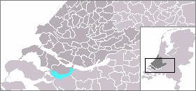 Kaart van het Volkerak, gemaakt uit sjabloon van Wikipedia-gebruiker Mtcv